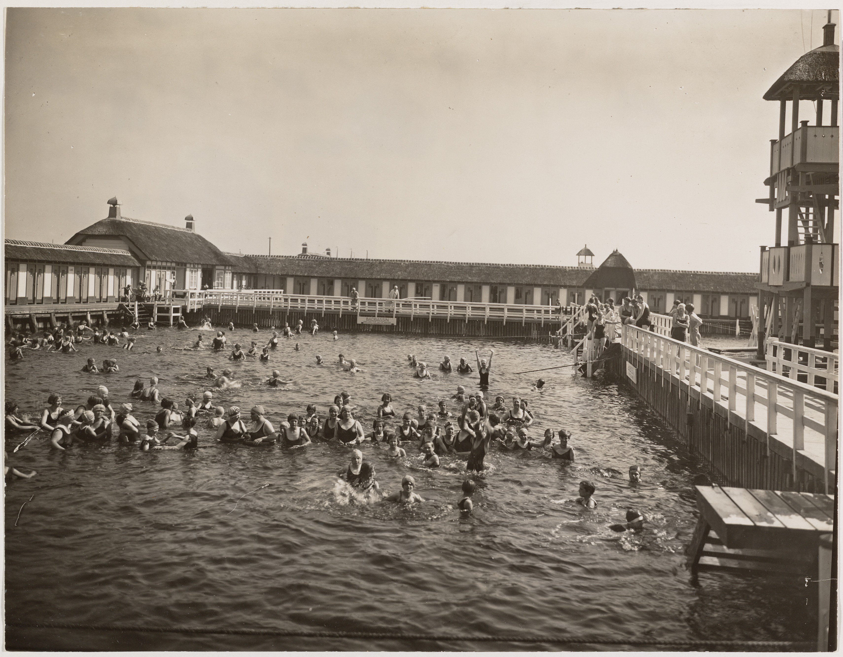 Beschrijving: Schinkel, Zwembad De Schinkel, Schinkelbad Documenttype: foto Collectie: Collectie Stadsarchief Amsterdam: foto-afdrukken Geografische naam: Schinkel, Schinkelbad Inventarissen: Afbeeldingsbestand: OSIM00004003276